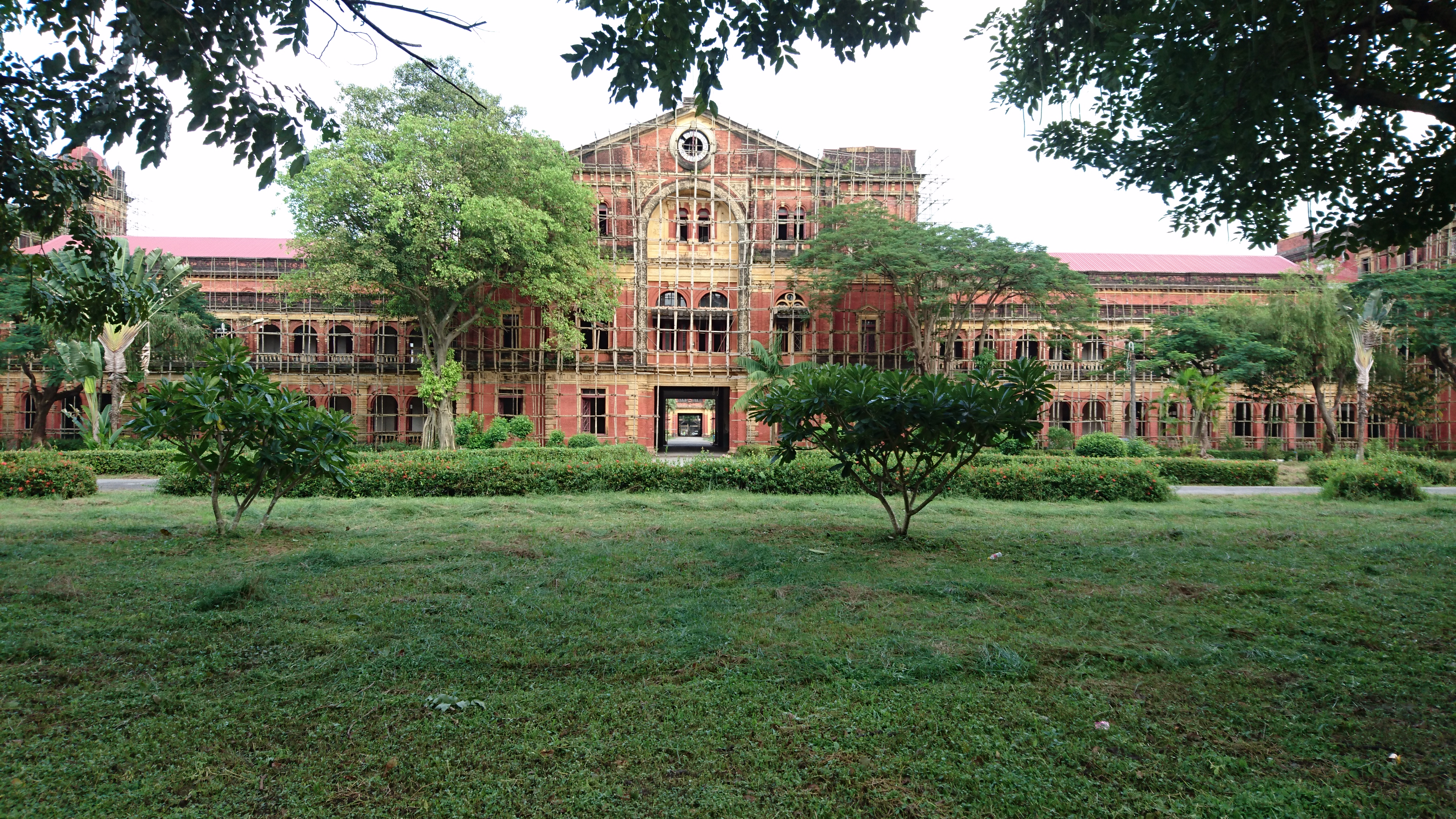 Foto de la entrada oeste (desde la calle) de este edificio, la mayoria del complejo esta cubierto de andamios, por lo que es posible que se esten realizando algun tipo de restauracion, a parte de este hecho actualmente aparenta totalmente abandonado.